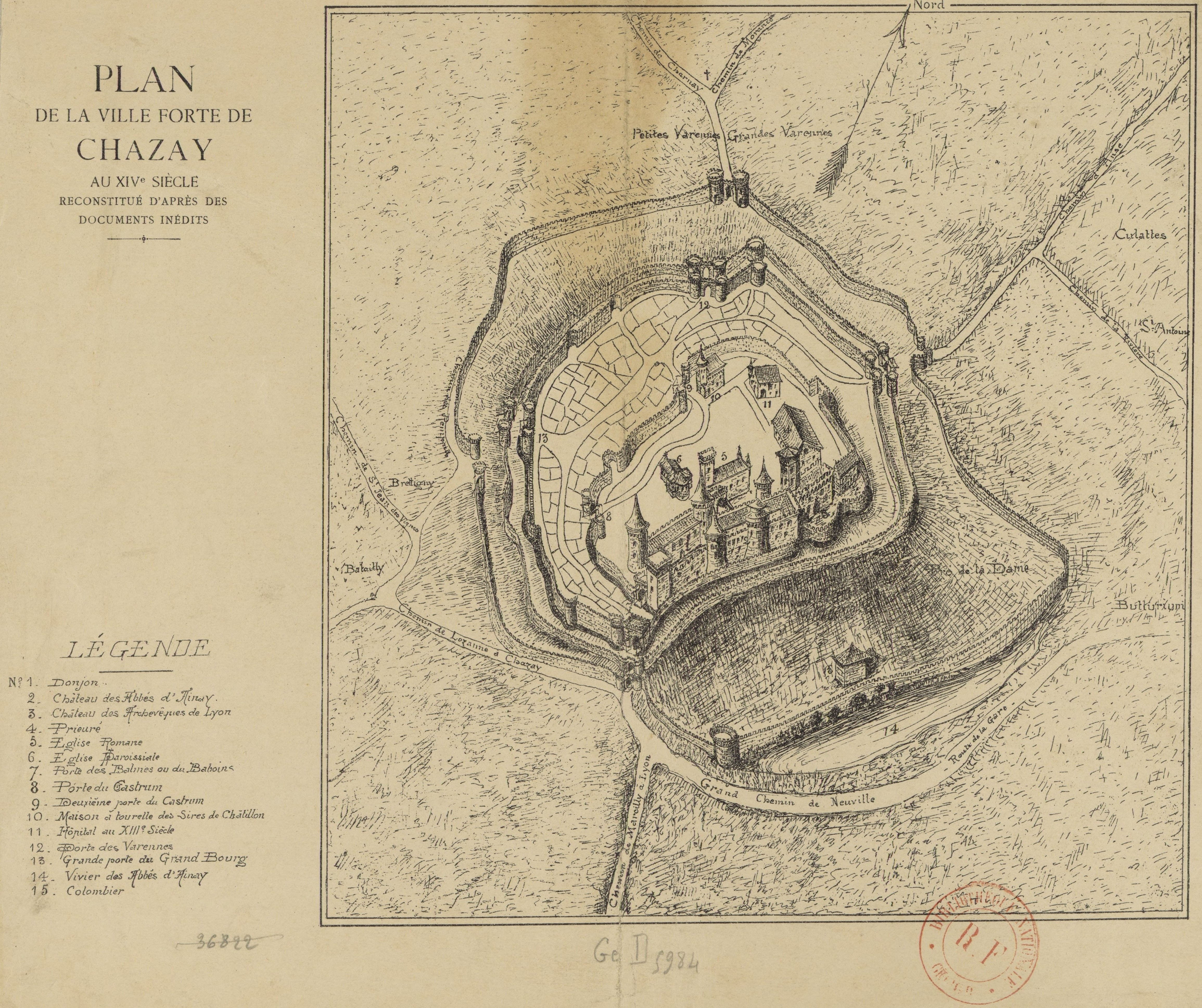 Plan de la ville forte de Chazay au XIVe siècle reconstitué d'après les documents inédits.